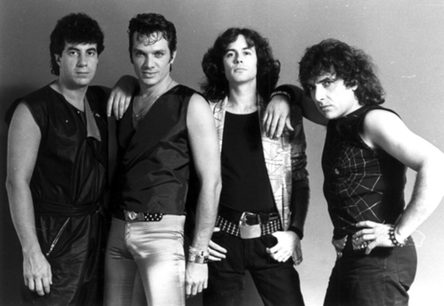 El grupo argentino Riff (izquierda a derecha): Moro, Vitico, Jaf y Pappo.